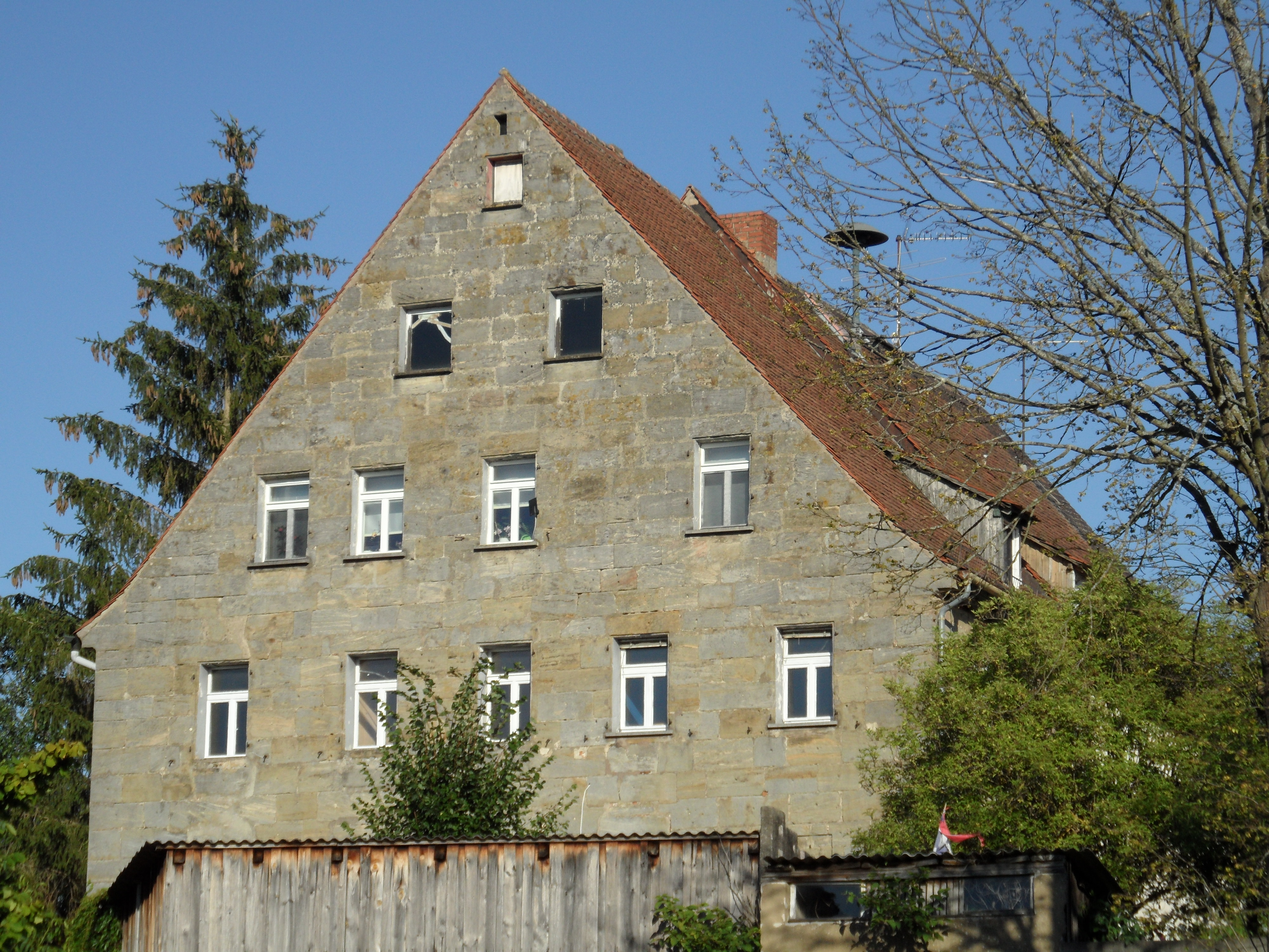 Das Muffelsche Schloss in EschenauThis is a photograph of an architectural monument.